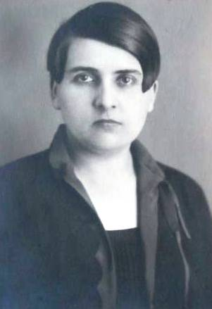 Vlasta Vostřebalová-Fischerová (1898-1963), česká malířka a feministická intelektuálka